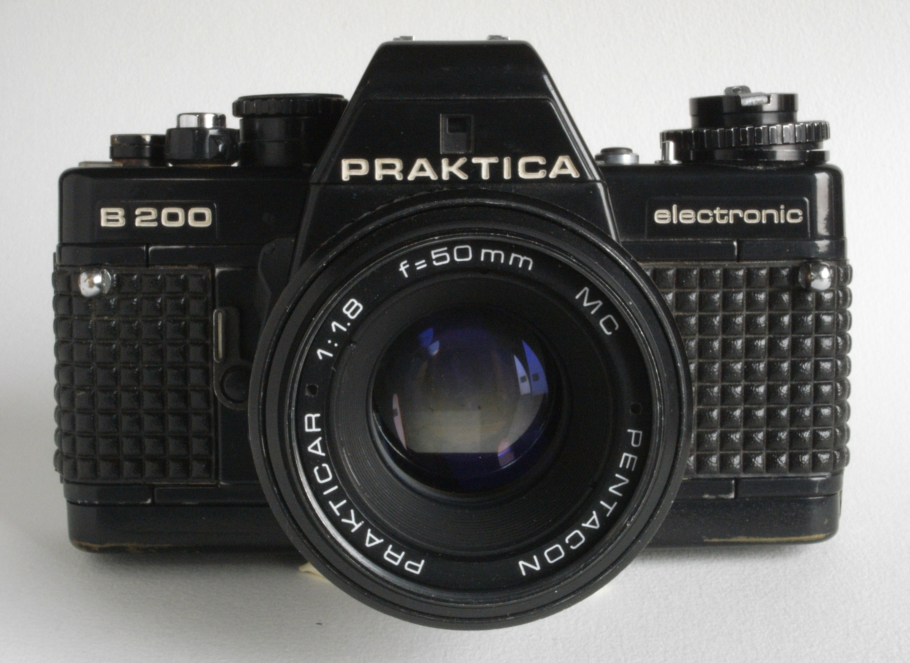 Praktica B 200 electronic